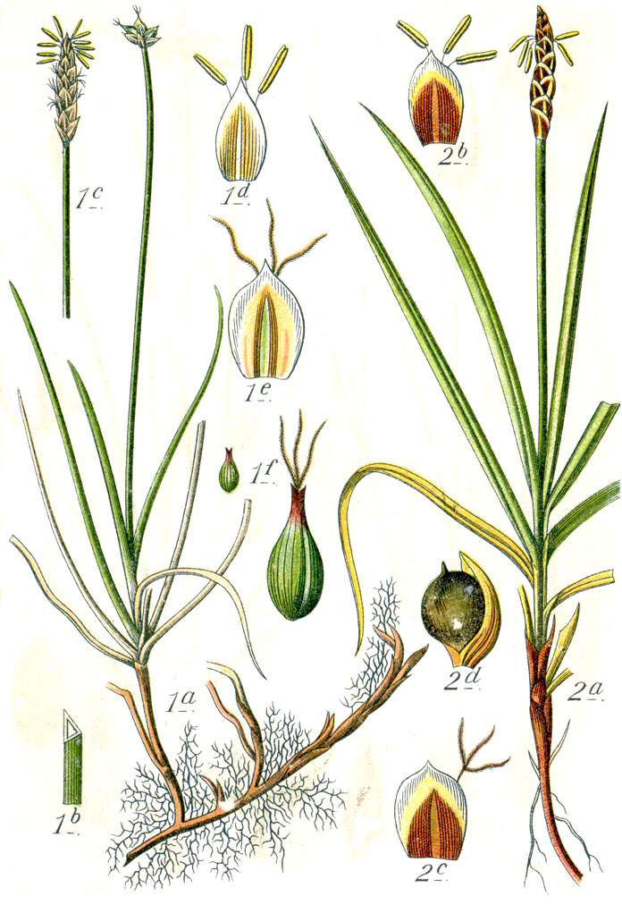 1. Carex obtusata Lilj., 2. Carex rupestris All. Original Caption 1. Stumpfe Segge, Carex obtusata 2. Felsen-Segge, C. rupestris